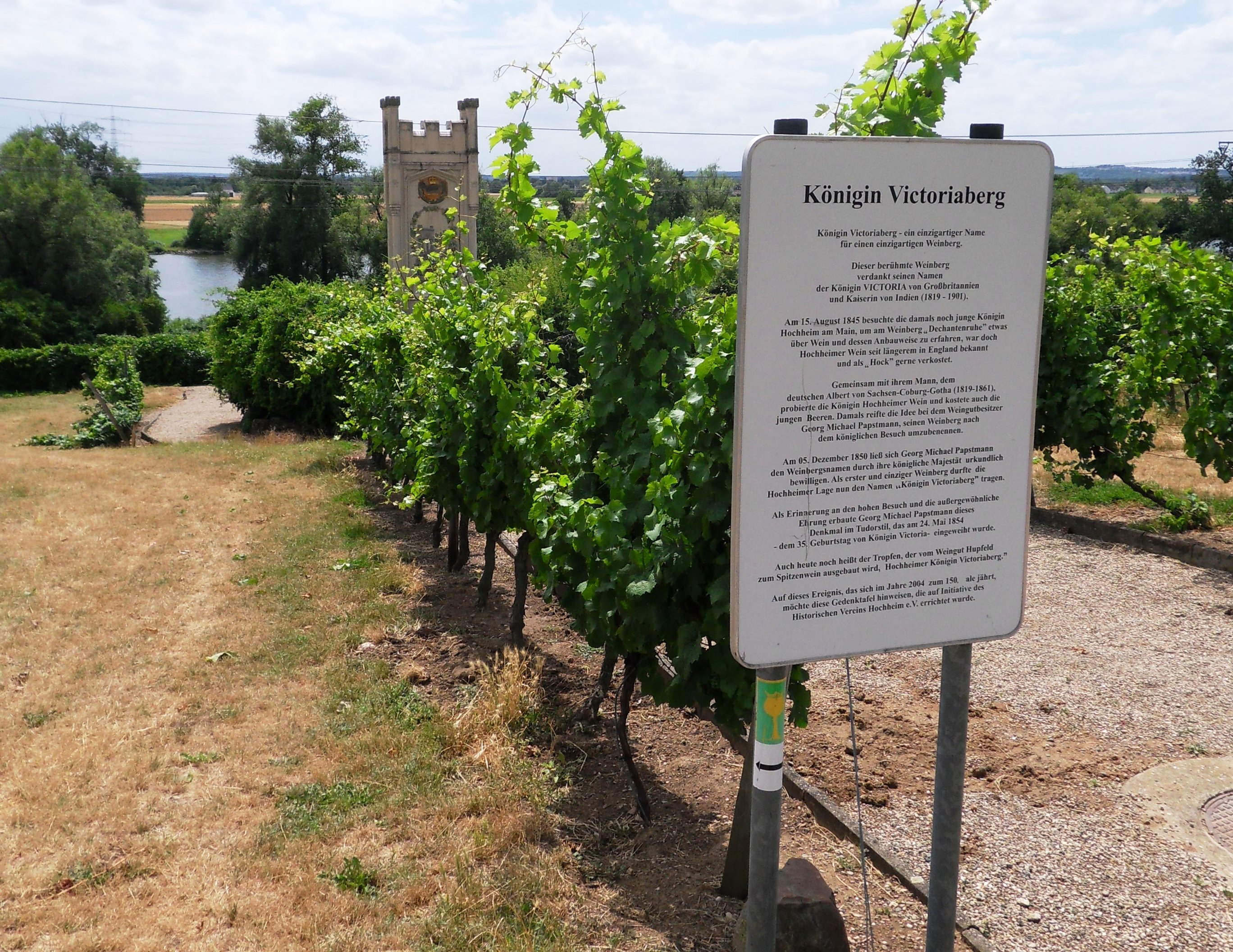 Zugang zum Königin-Viktoria-Denkmal in den Weinbergen der Stadt Hochheim am Main mit Erläuterungstafel. Im Hintergrund ist der Main zu sehen